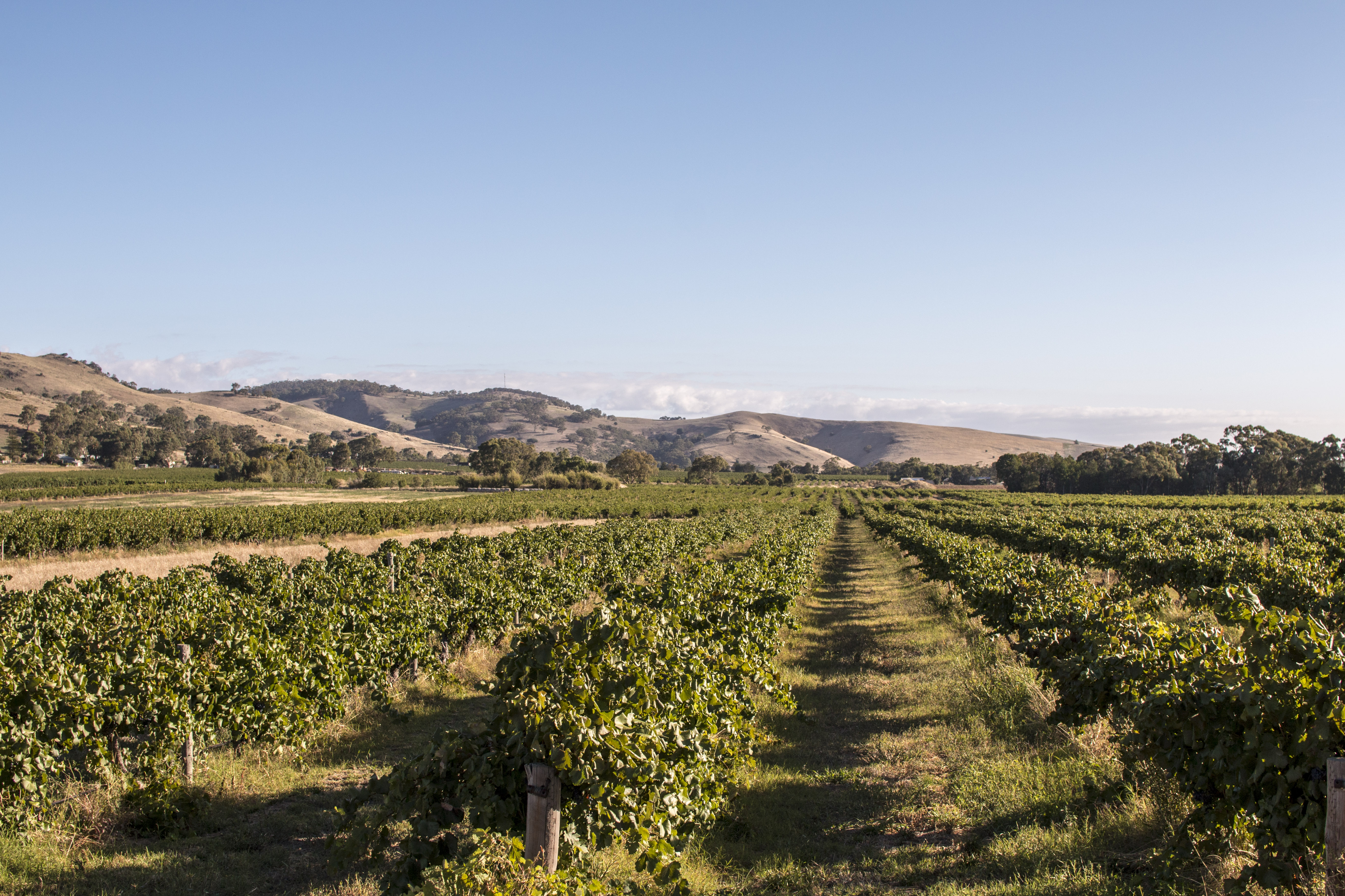 Vignoble de la Barossa Valley